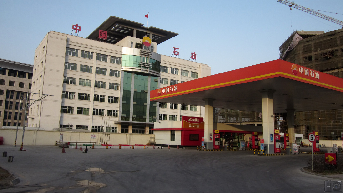 中国石油&加油站